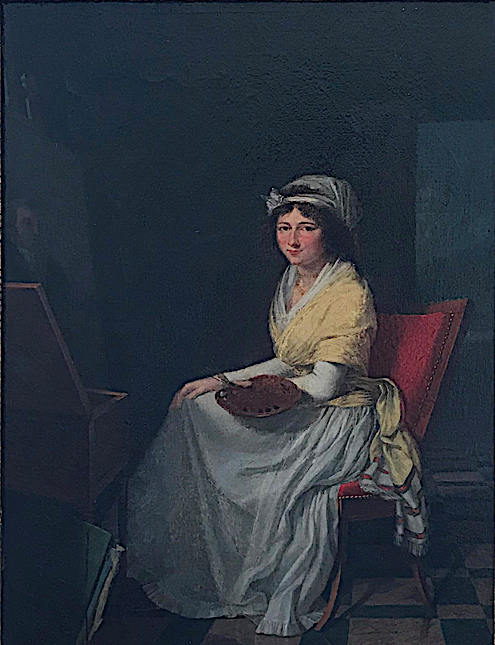 Jean-Joseph Ansiaux (1764-1840) Portrait de Constance Charpentier Huile sur toile - 32,5 x 24 cm Liège, Musée Grétry, dépôt de la Fondation roi Baudouin Photo : Fondation roi Baudouin